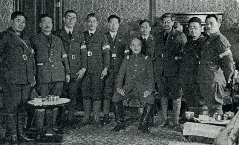 この写真は棚橋小虎(1889-1973)の1937年のものです。